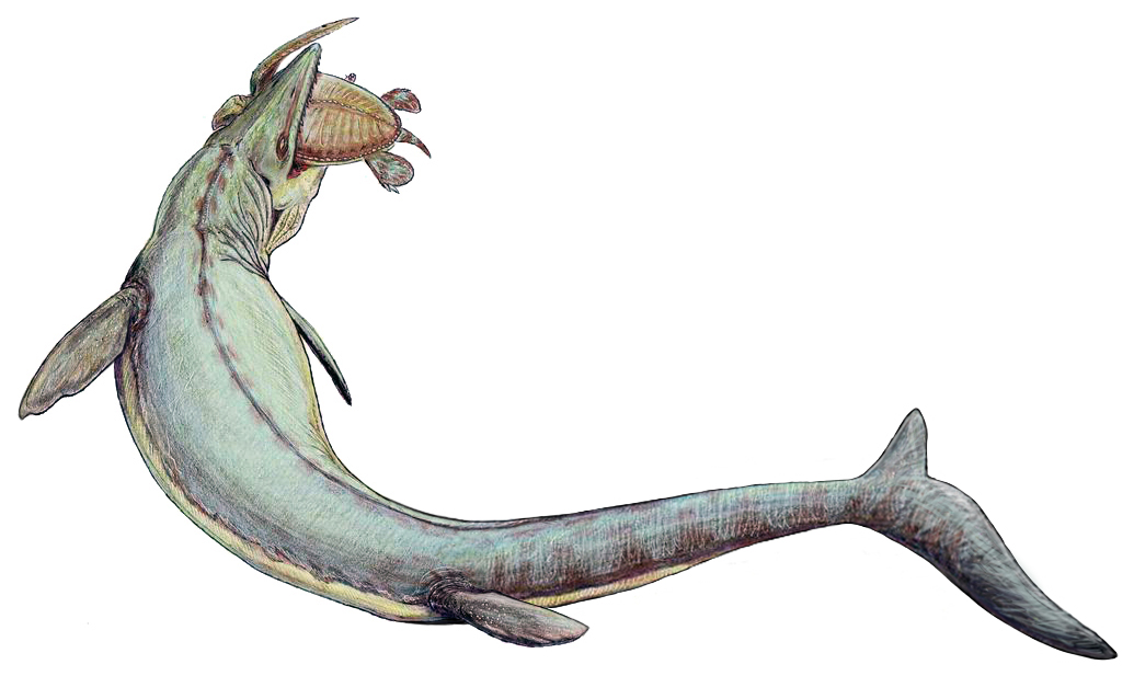 Mosasaurus hoffmanni.